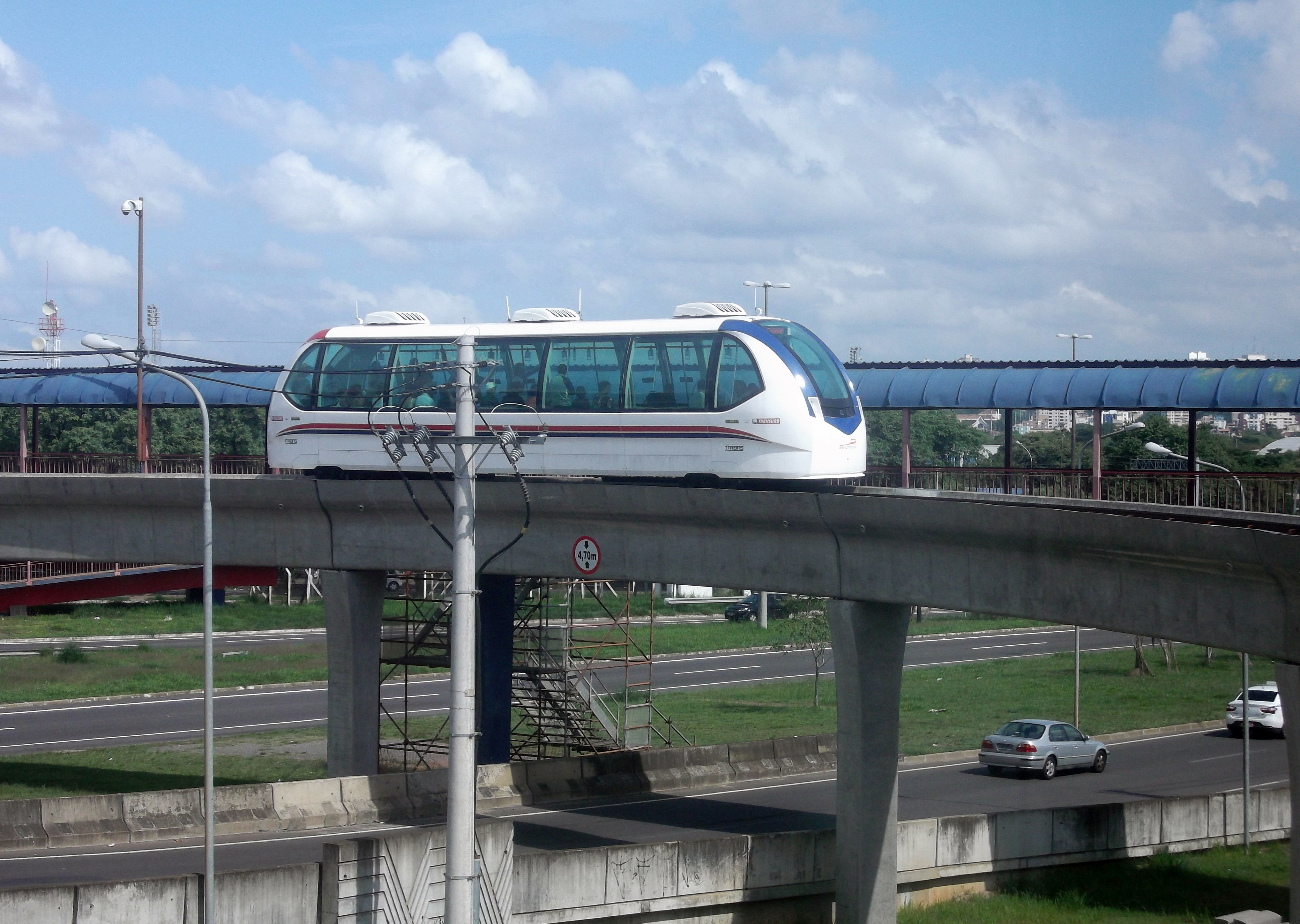 Aeromovel